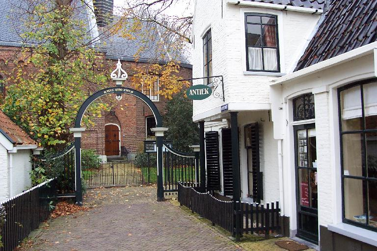 Sint Pitertsjerke Grou